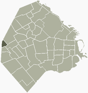 Barrio de Villa Real